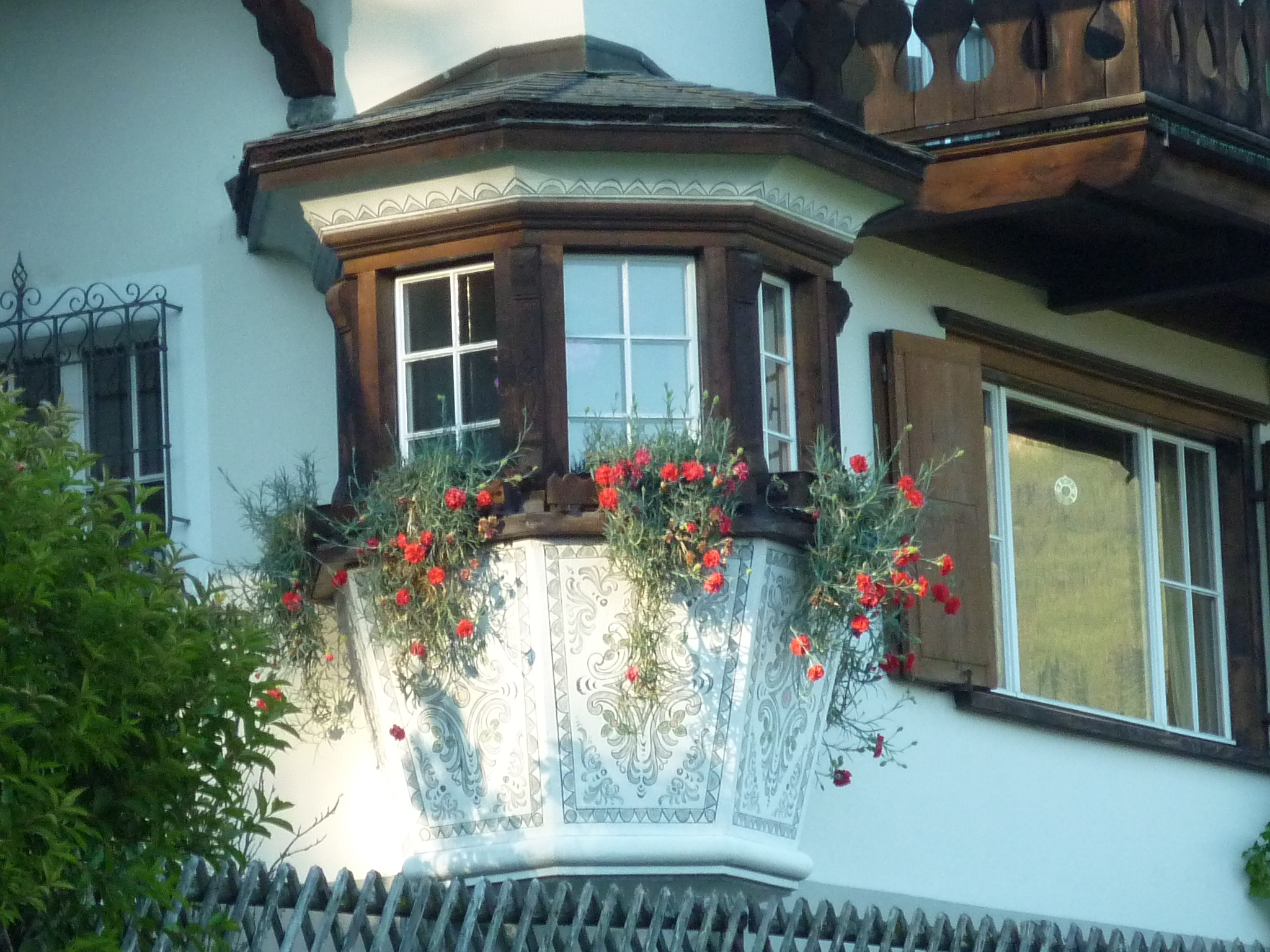 Hängenelken, Luzein GR, Schweiz